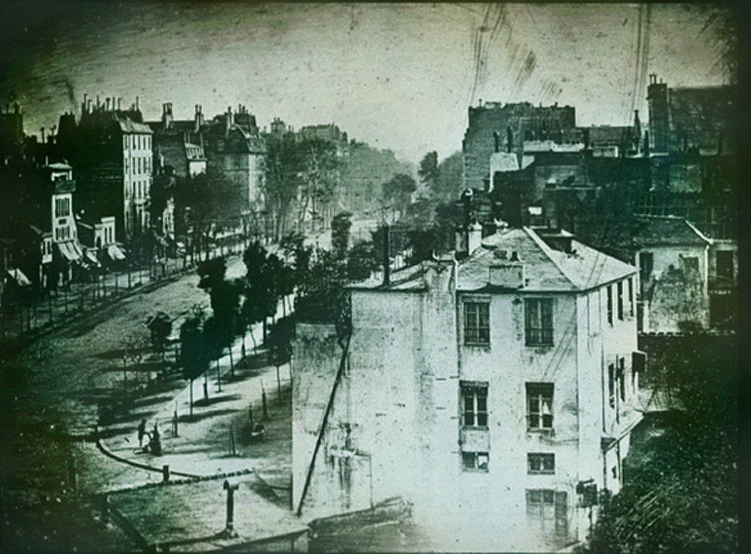 Boulevard du Temple, 1839